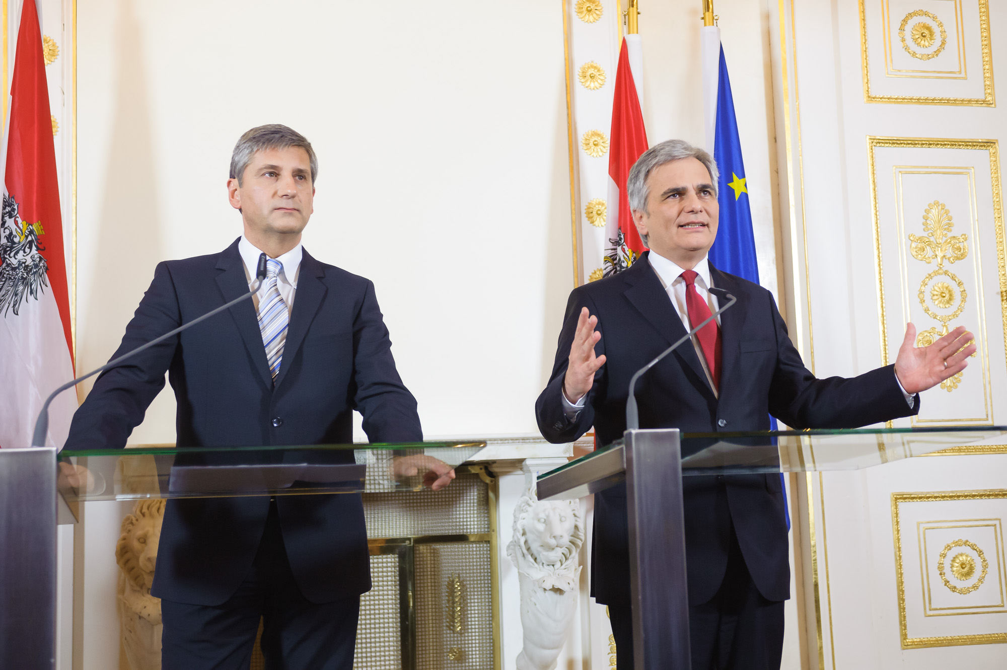 Bundeskanzler Werner Faymann hat in einem gemeinsamen Presse-Statement mit Vizekanzler Spindelegger den positiven Abschluss der Koalitionsverhandlungen und die Einigung auf ein Arbeitsprogramm der neuen Bundesregierung präsentiert. - Details unter Foto: SPÖ/Thomas Lehmann